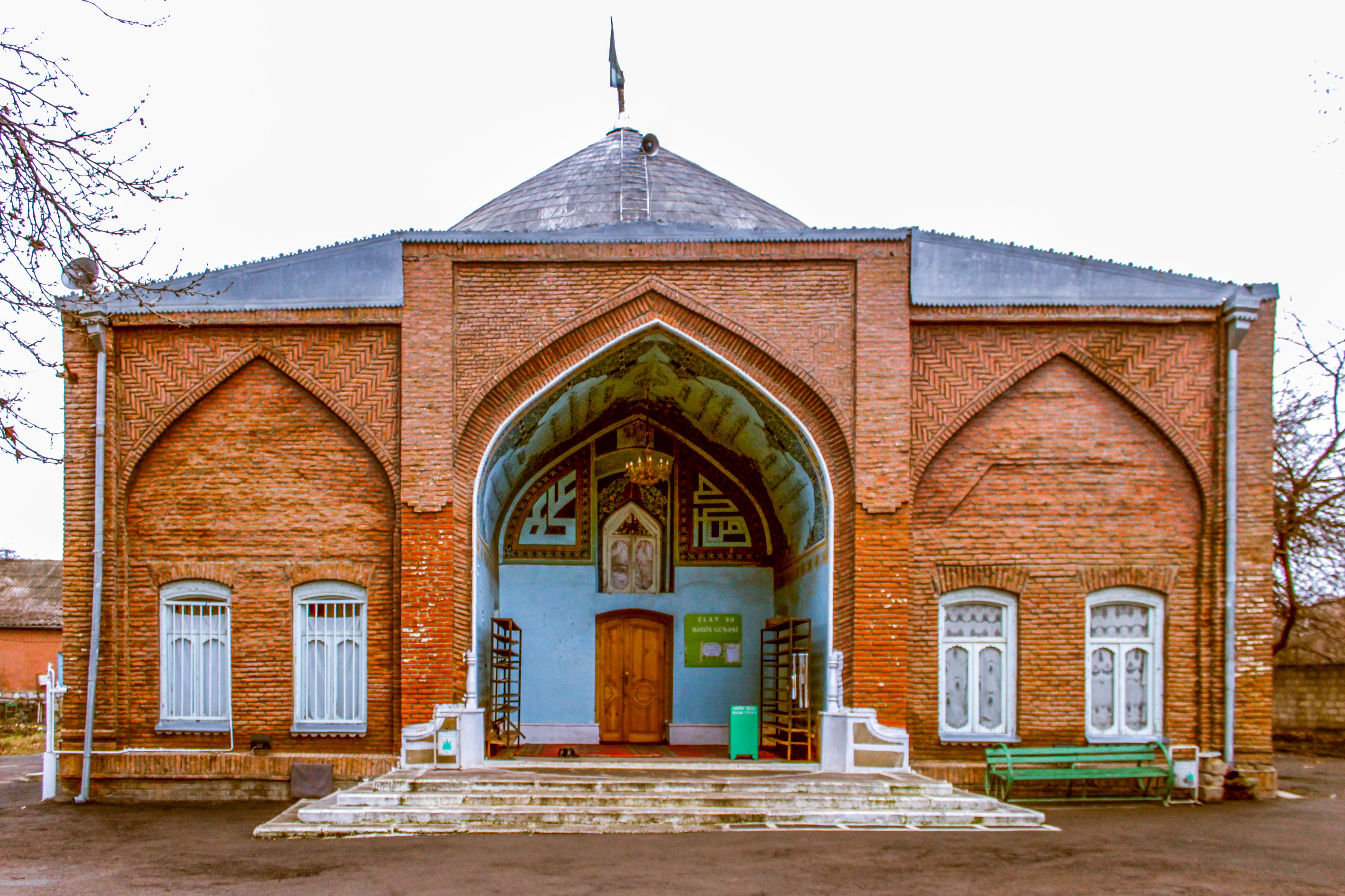 Qazaxlar məscidi